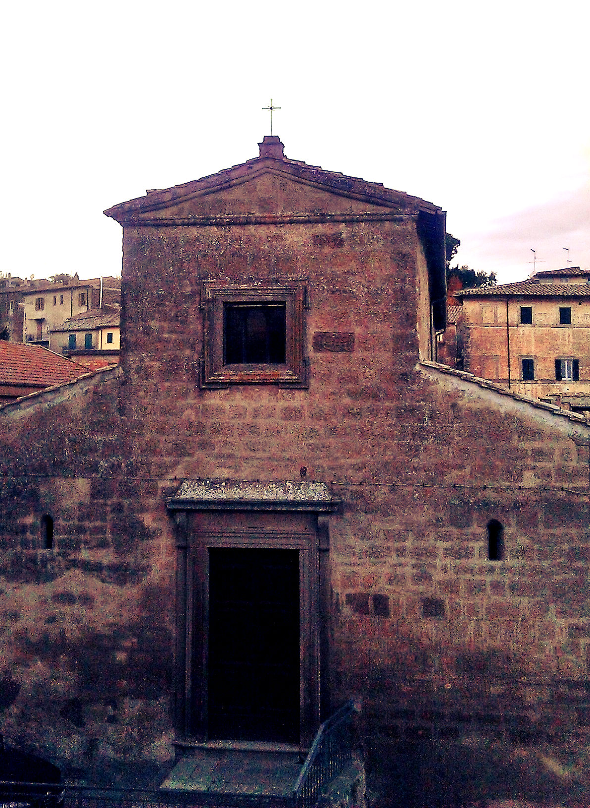 Bassano in Teverina (VT) - Chiesa di Santa Maria dei Lumi